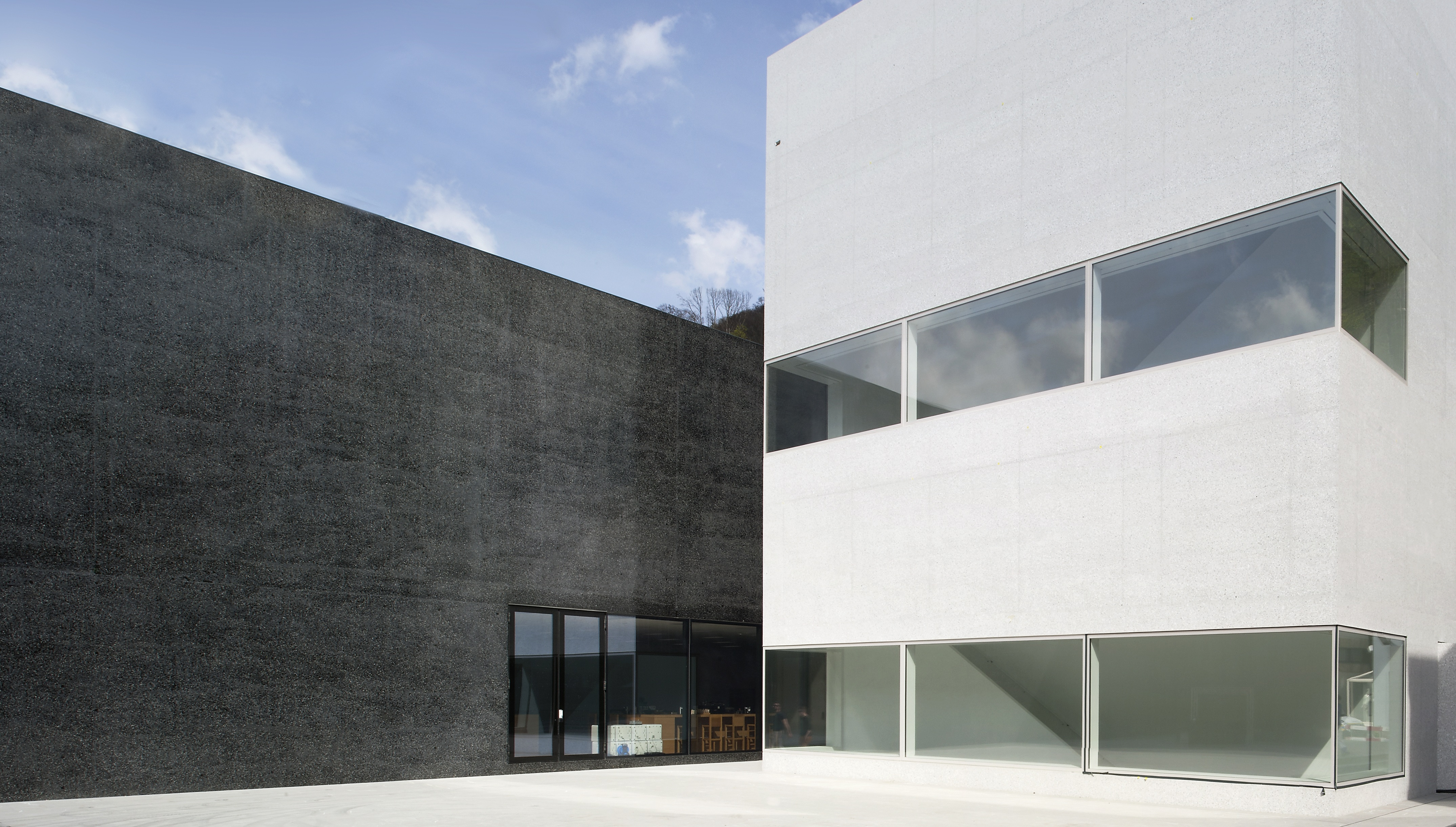 Kunstmuseum Liechtenstein mit der Erweiterung Hilti Art Foundation